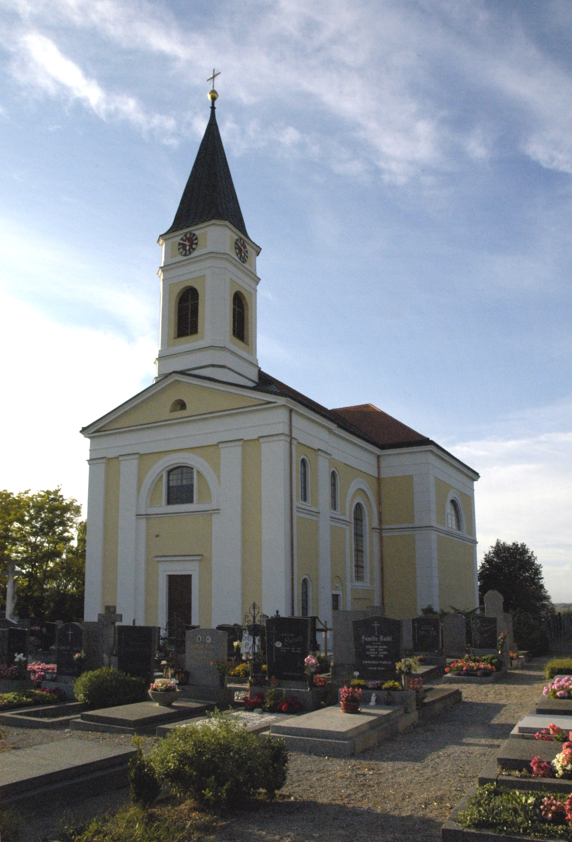 katholische Pfarrkirche heiliger Bartholomäus in Kammersdorf, Gemeinde Nappersdorf-Kammersdorf